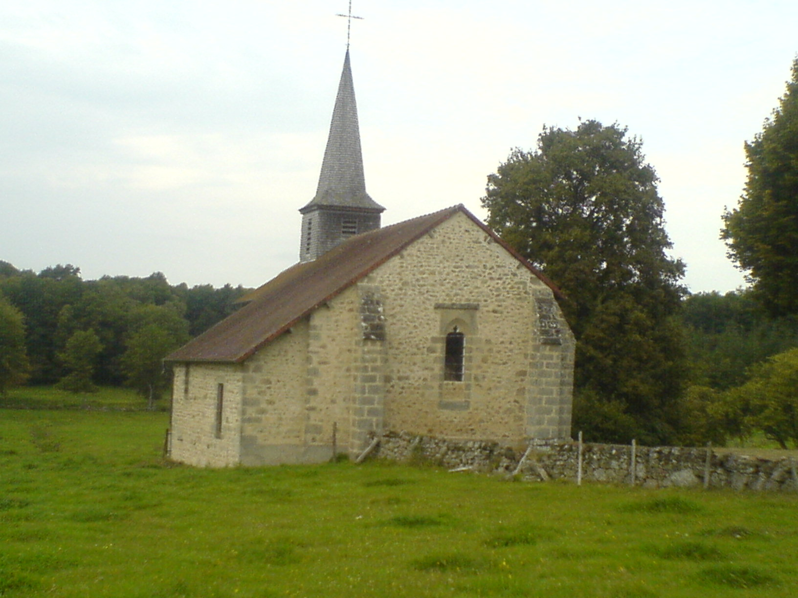 église